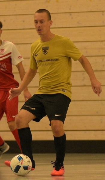 Markus Giesecke im Trikot des TV Wackersdorf Futsal (2016)